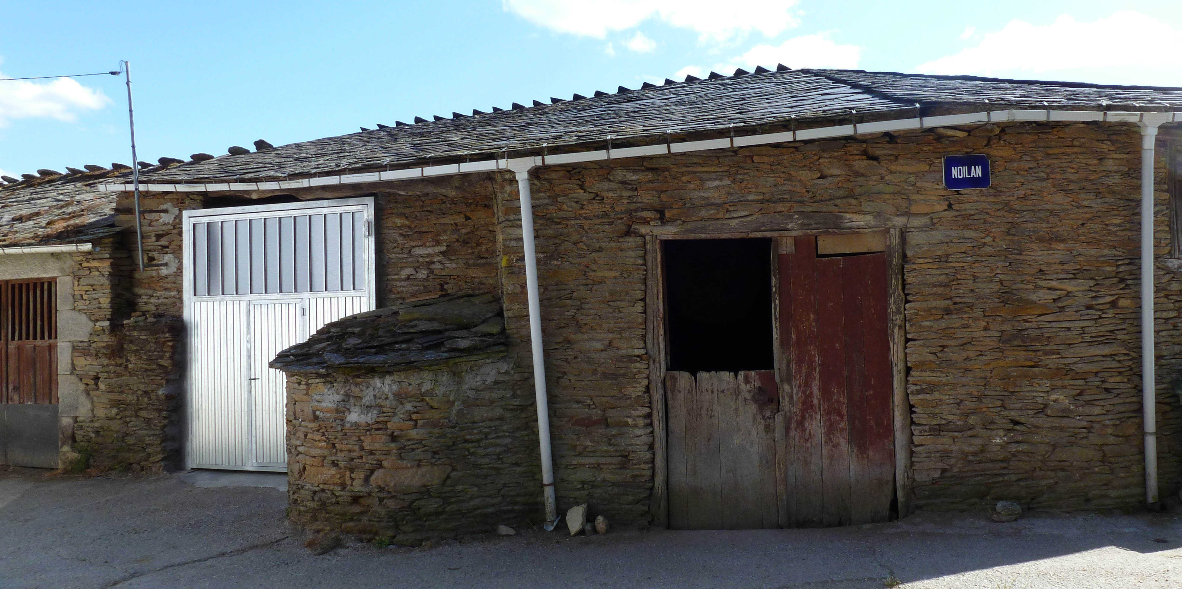 Lugar de Noilán, parroquia da Cervela, concello do Incio, Lugo